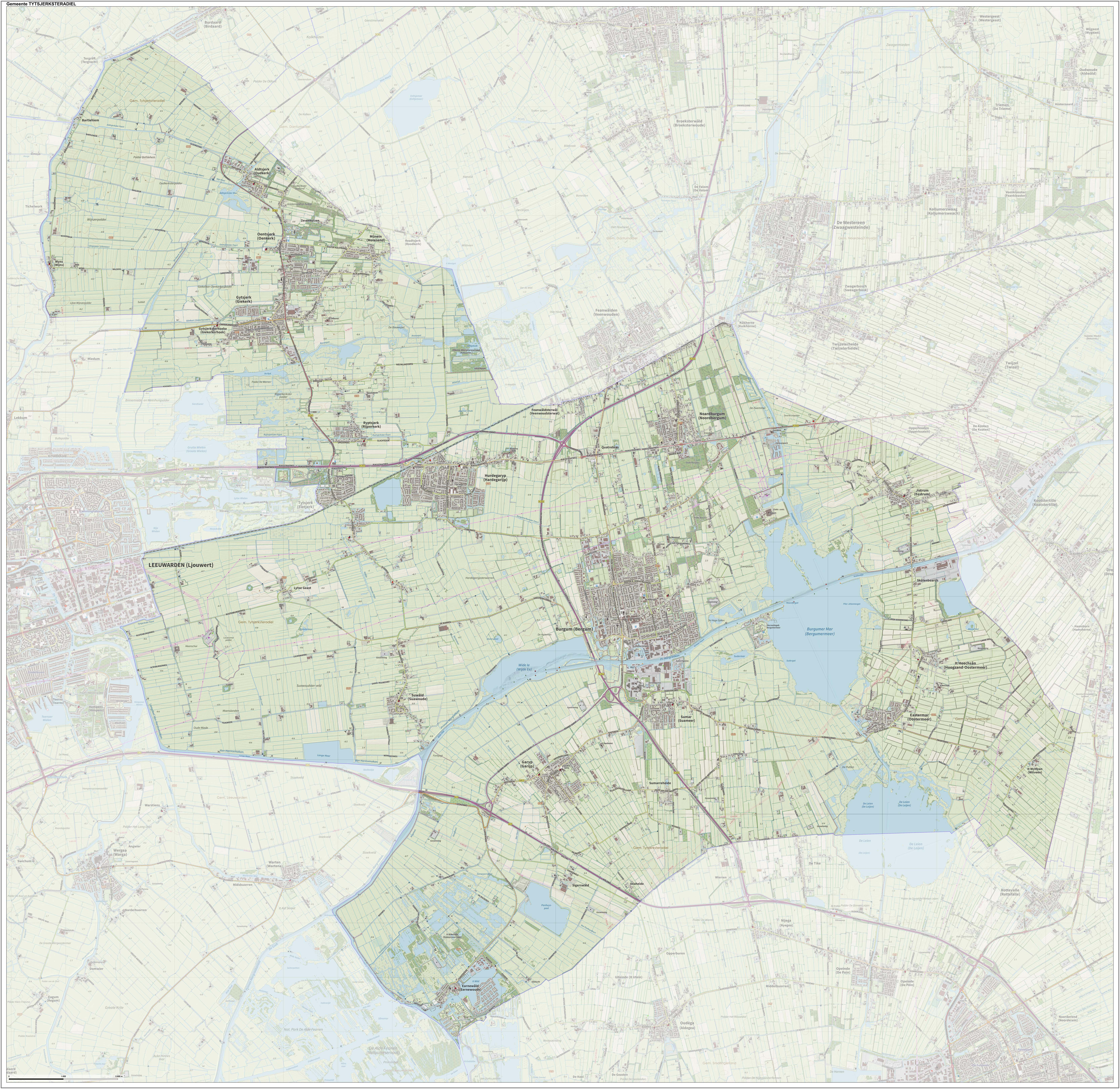 Topografische gemeentekaart. Resolutie: 400 pixels/km. Kaartbeeld samengesteld uit de open geodata van de Top10NL en Top25namen (Kadaster), Creative Commons-BY licentie. Gebouwvlakken uit open geodata BAG extract. Wegen uit de OpenStreetMap, OpenStreetMap community. Reliëfschaduw uit de Actuele Hoogtekaart AHN2. Samenstelling en kleurenschema: Jan-Willem van Aalst, met QGIS. Zie ook de Legenda.